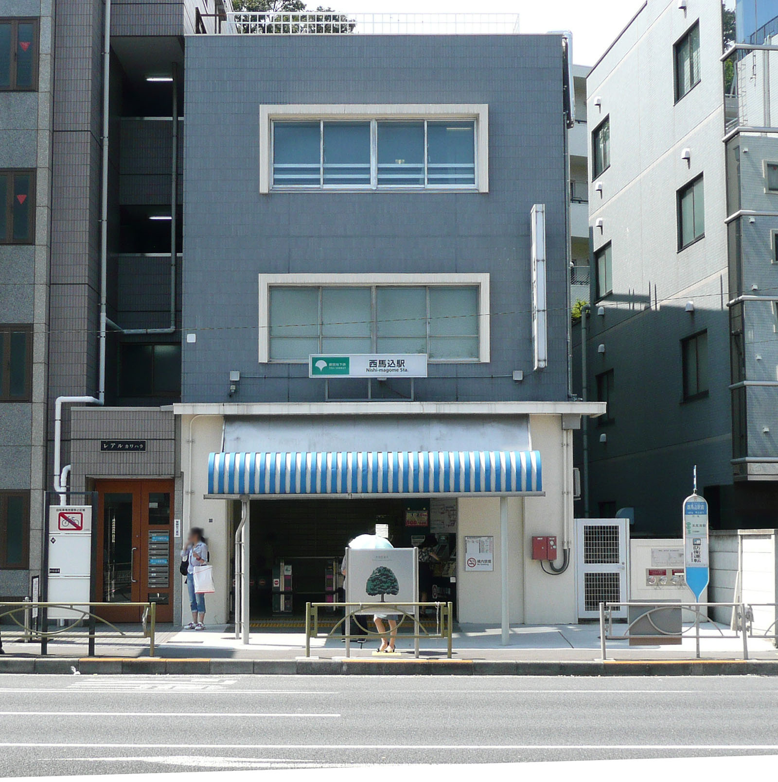 西馬込駅西口